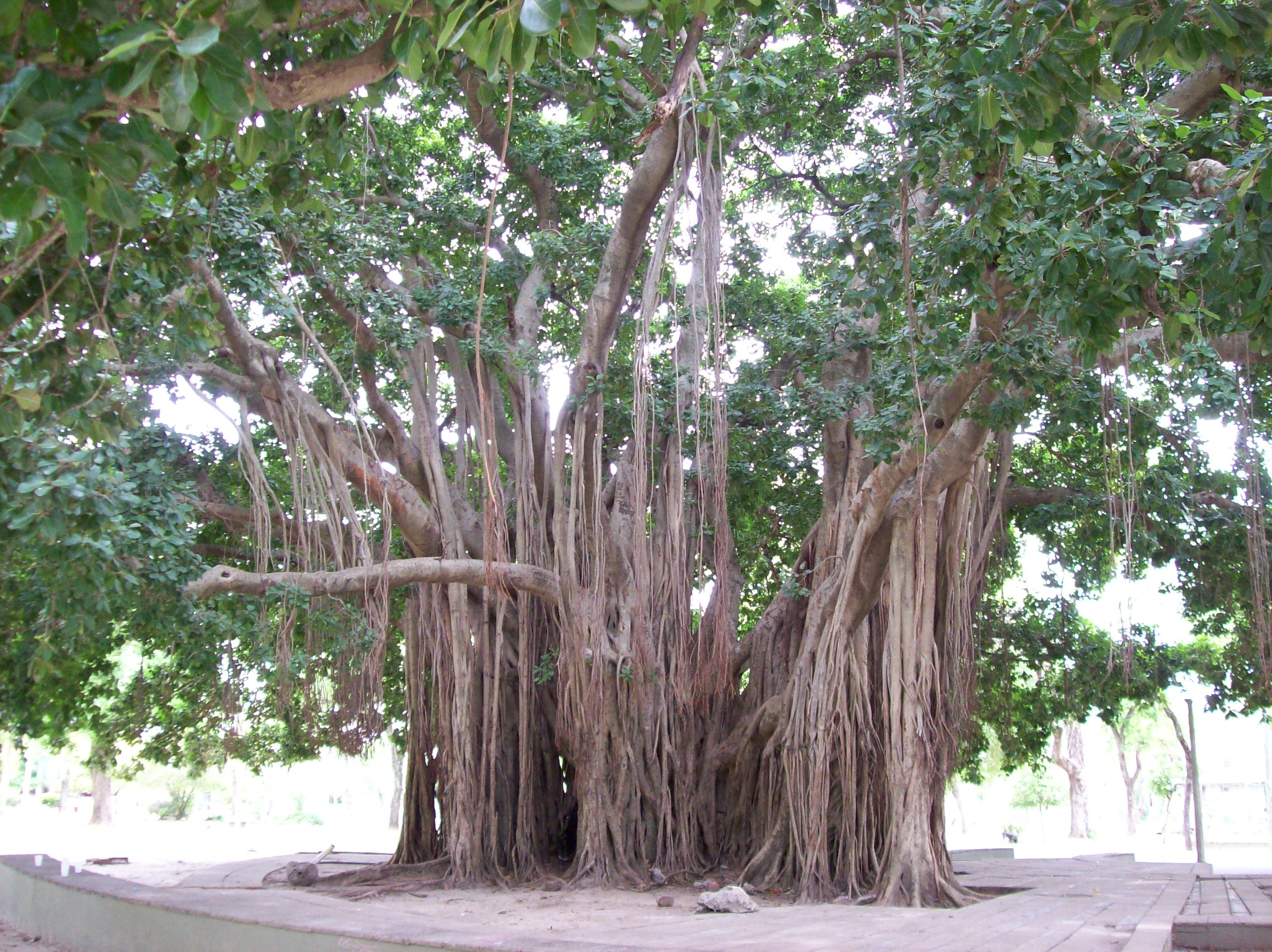 Gomero de la India en el Parque Mitre dentro de la Ciudad de Corrientes, Argentina.